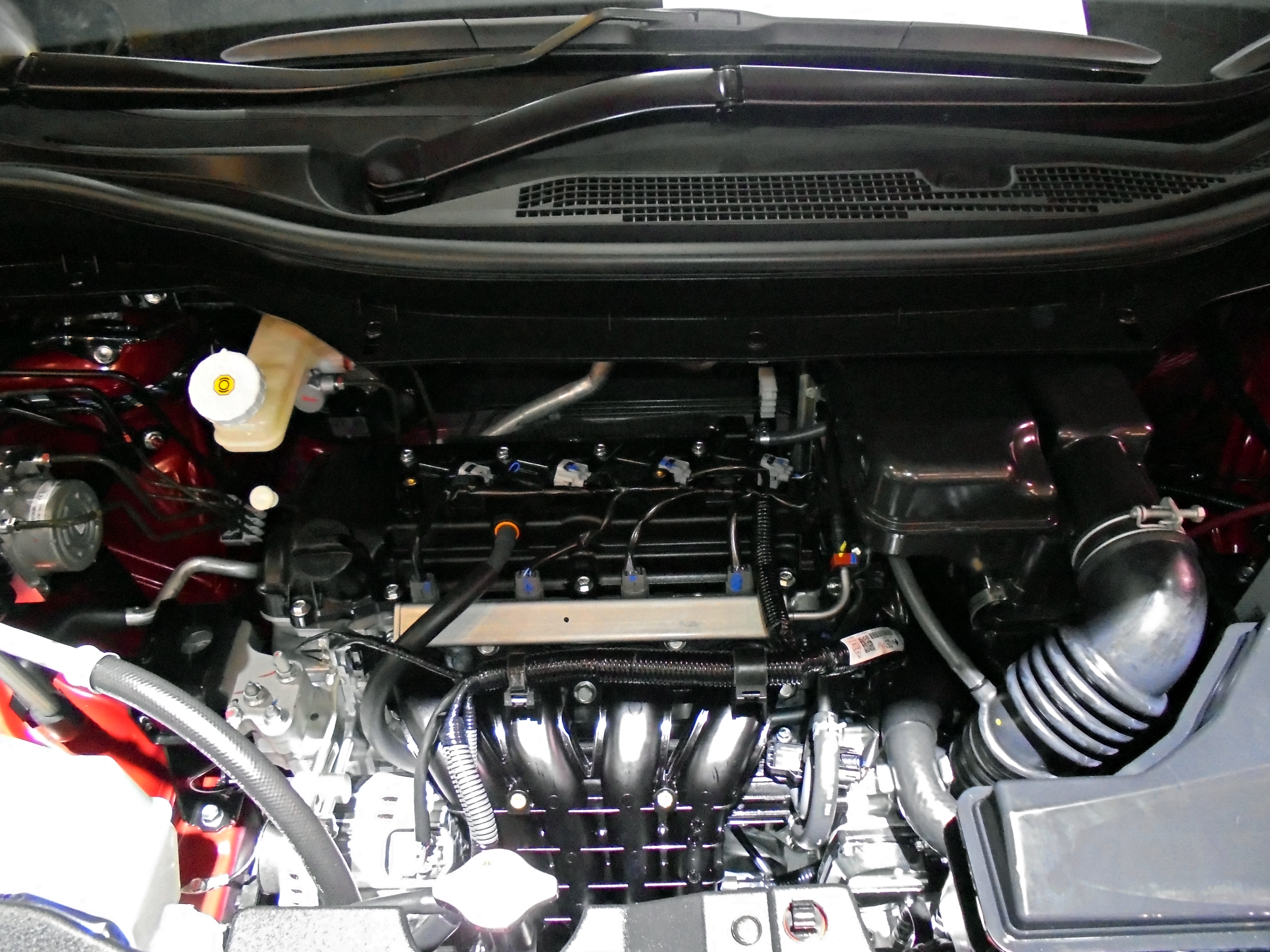 日産・リヴィナ 4A91 エンジン